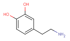 molécule de dopamine Auteur : Yohan